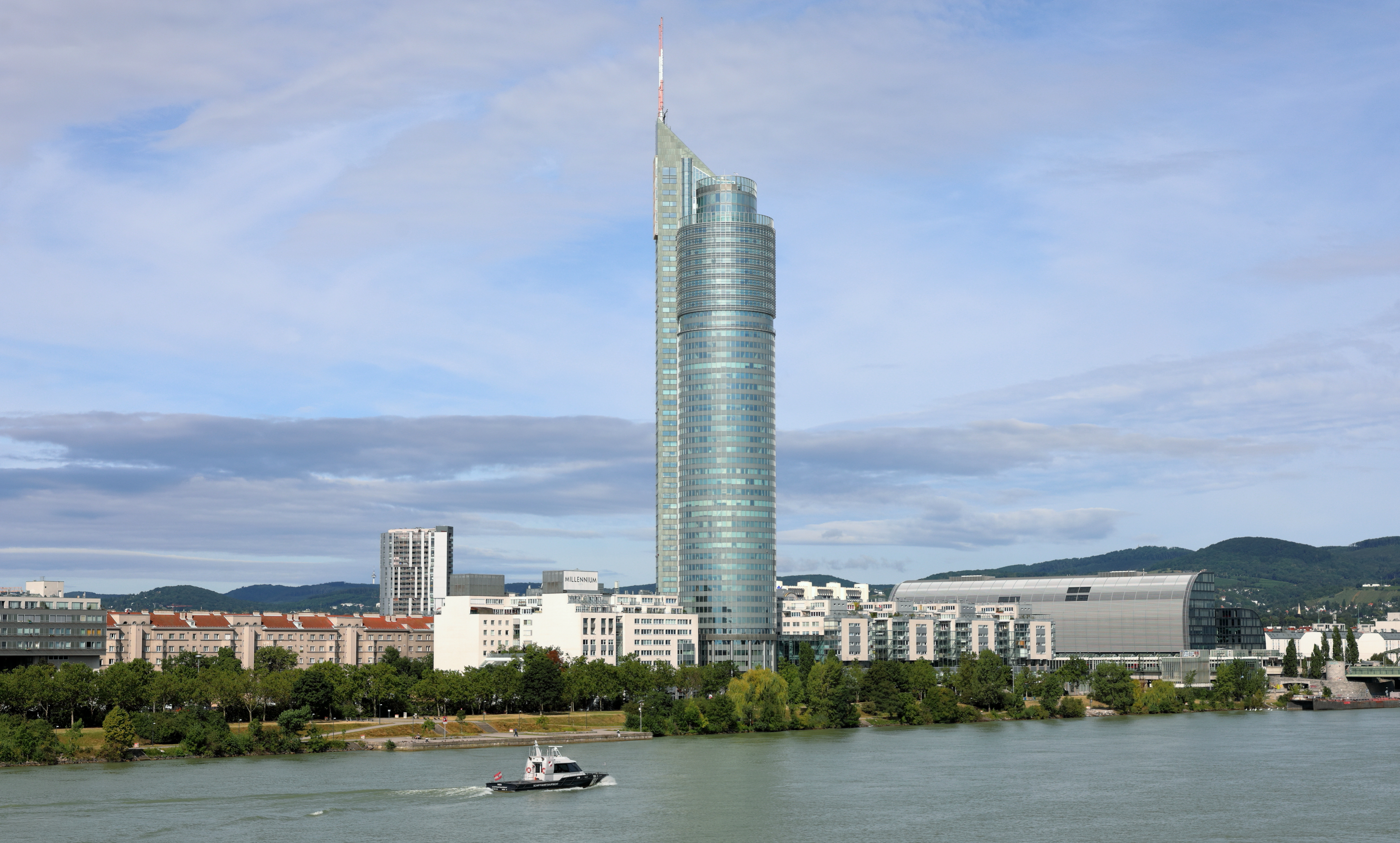 Der Millennium Tower im 20. Wiener Gemeindebezirk Brigittenau von der Brigittenauer Brücke aus gesehen.Das Büro- und Wohnhochhaus wurde von 1997 bis 1999 nach Plänen der Architekten Gustav Peichl, Boris Podrecca und Rudolf F. Weber für den Bauherrn Georg Stumpf mit einem Kostenaufwand von rd. 210 Millionen Euro errichtet. Das Gebäude hat eine Gesamthöhe von 202 Meter (Dachfirst 160 Meter) und ist damit nach dem Donauturm (252 Meter) und dem ersten Hochhaus der DC Towers (250 Meter) das dritthöchste Gebäude Wiens. Der Tower hat über 50 Geschosse, rund 47.200 Quadratmeter Büro- und 30.000 Quadratmeter Wohnfläche sowie 14.000 Quadratmeter für Dienstleistungs- beziehungsweise 10.000 Quadratmeter für Einzelhandelsbetriebe.